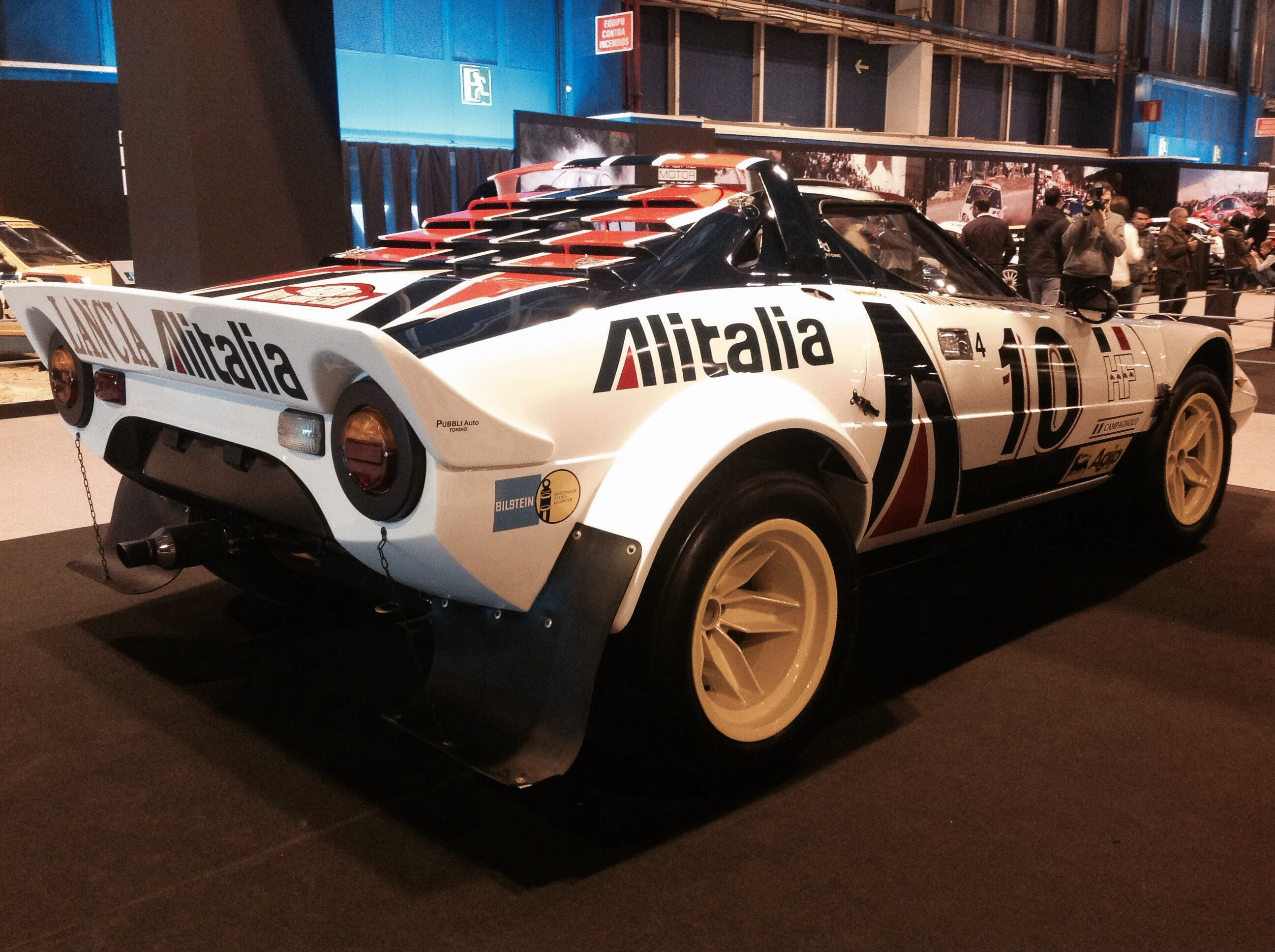 Lancia Stratos en Madrid Motor Days 2014.